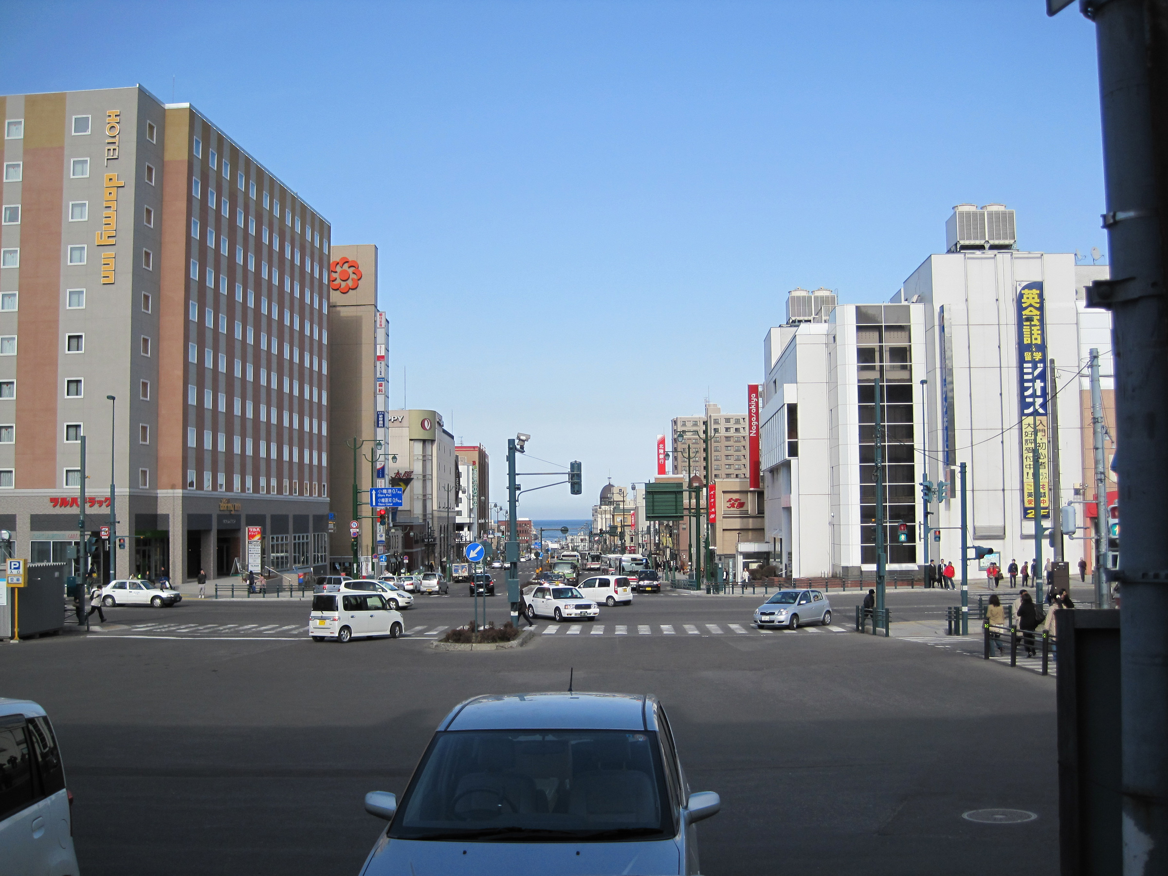 小樽駅前の様子、駅から小樽港（日本海）が視認できる。